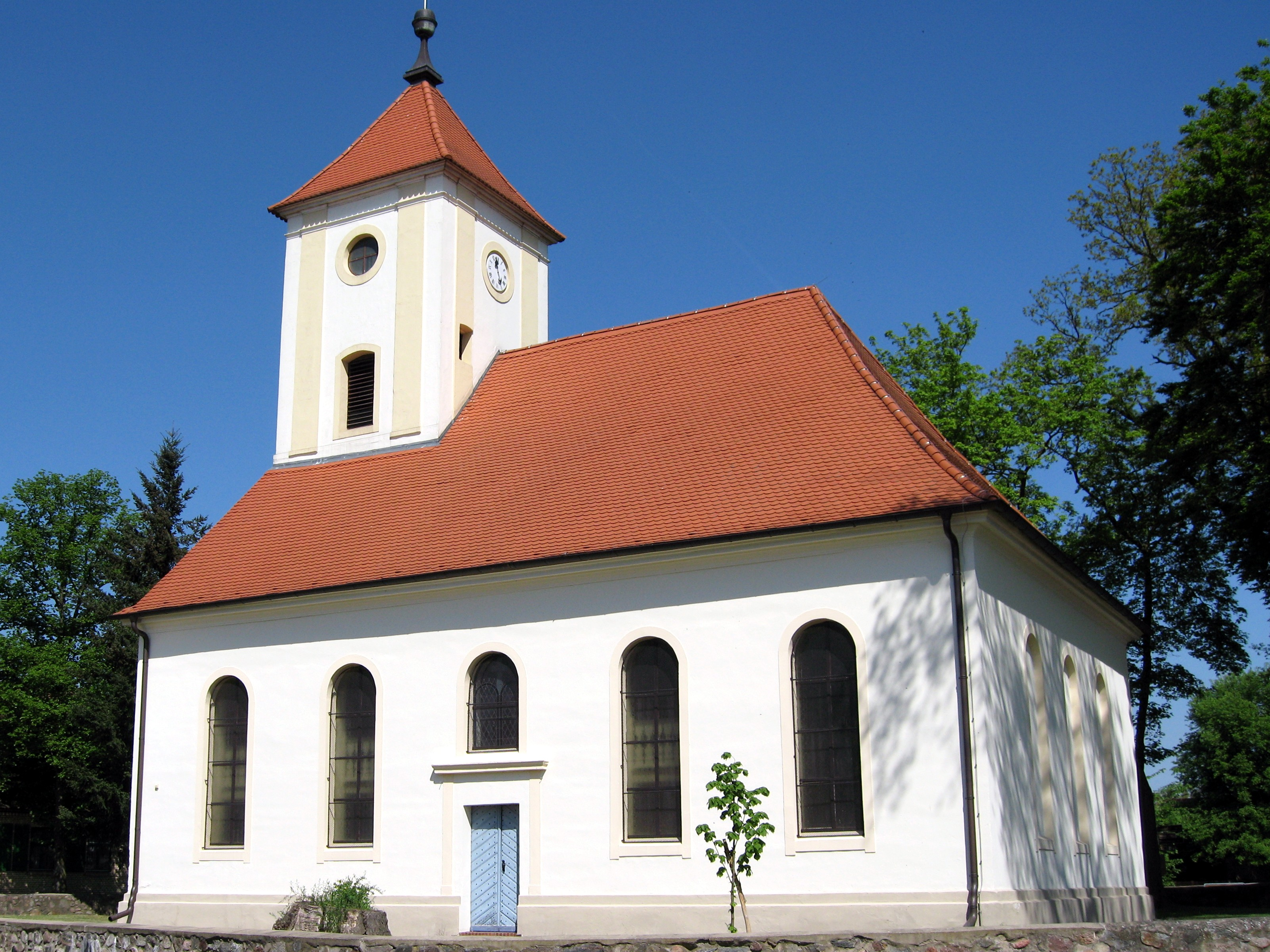 Kirche Ruhlsdorf, Gemeinde Marienwerder, Landkreis Barnim, Land Brandenburg, Deutschland